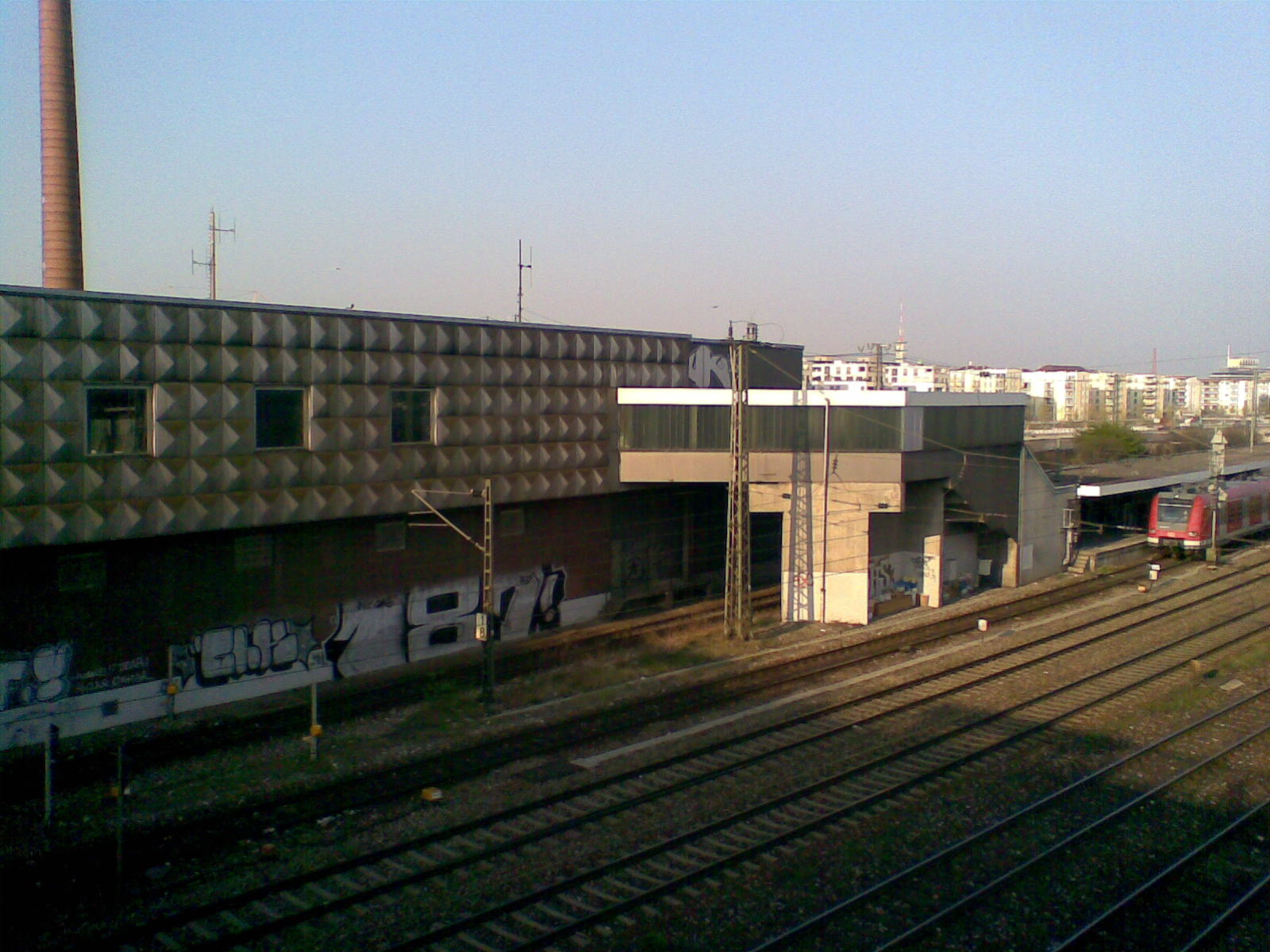 München S-Bahn-Station Donnersberger Brücke, Südseite